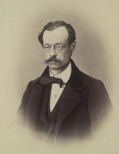 Richard Belcredi (1823–1902)